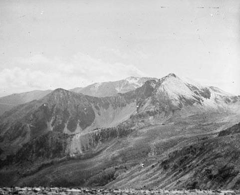 Imatge